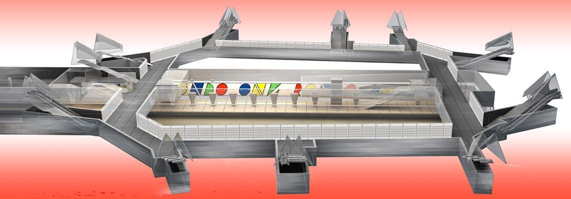 Wielobranżowy Projekt Koncepcyjny centralnego odcinka II lini metra w Warszawie